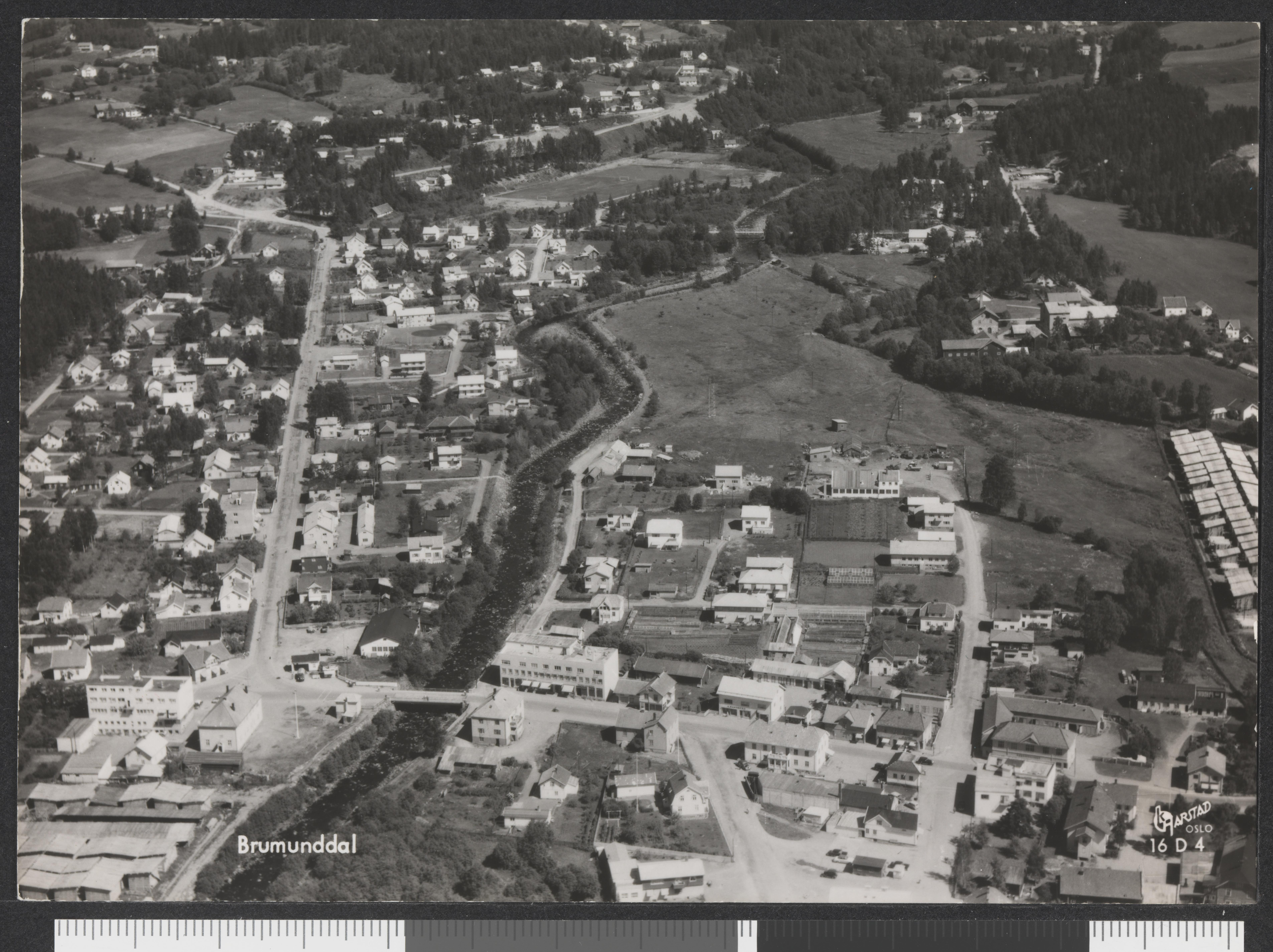 Bildet er hentet fra Nasjonalbibliotekets bildesamling Brumundal, Ringsaker, Hedmark